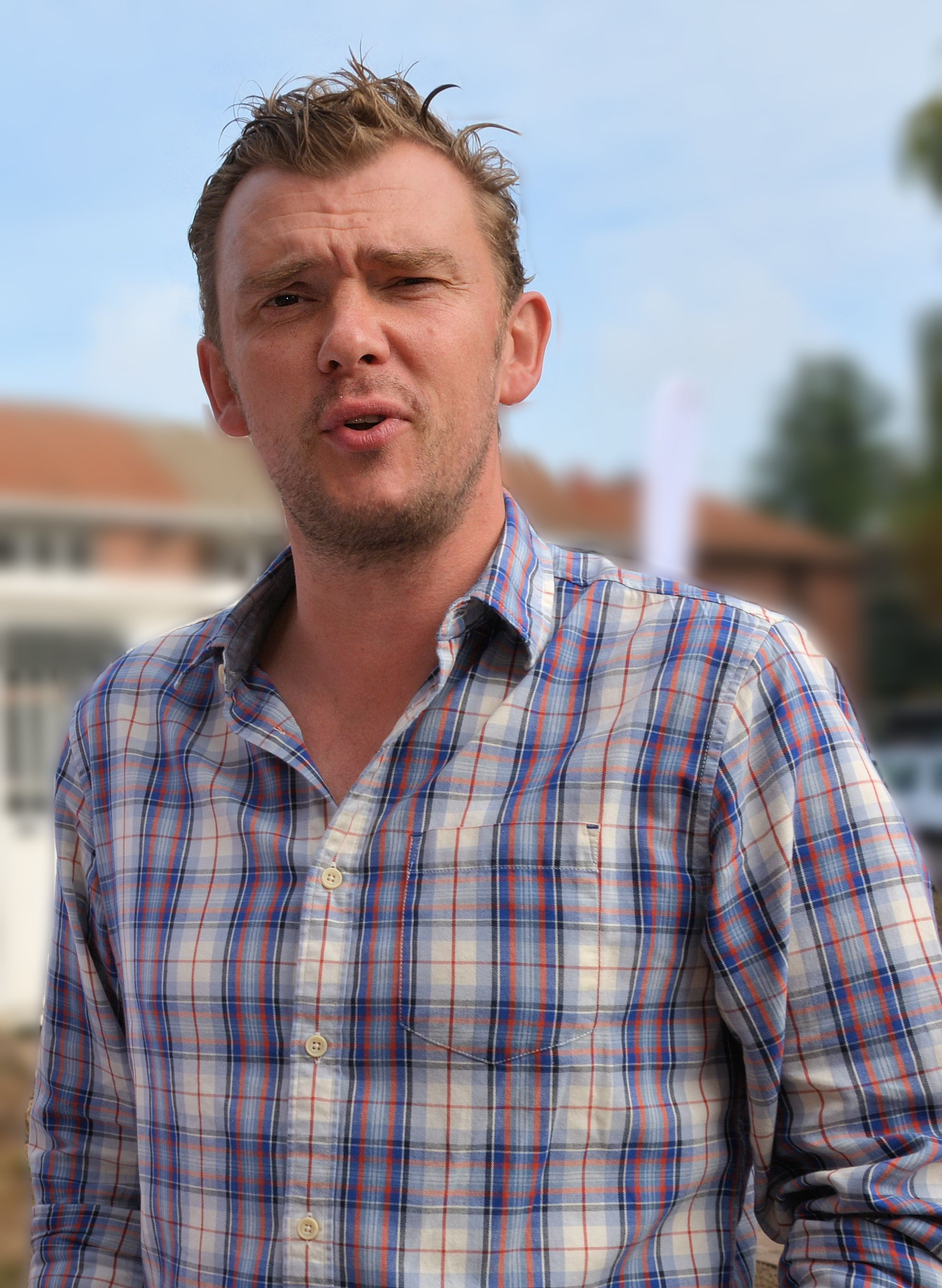 Christophe Stienlet tijdens een eerste steenlegging van 26 nieuwe bejaardenflats in Mechelen.